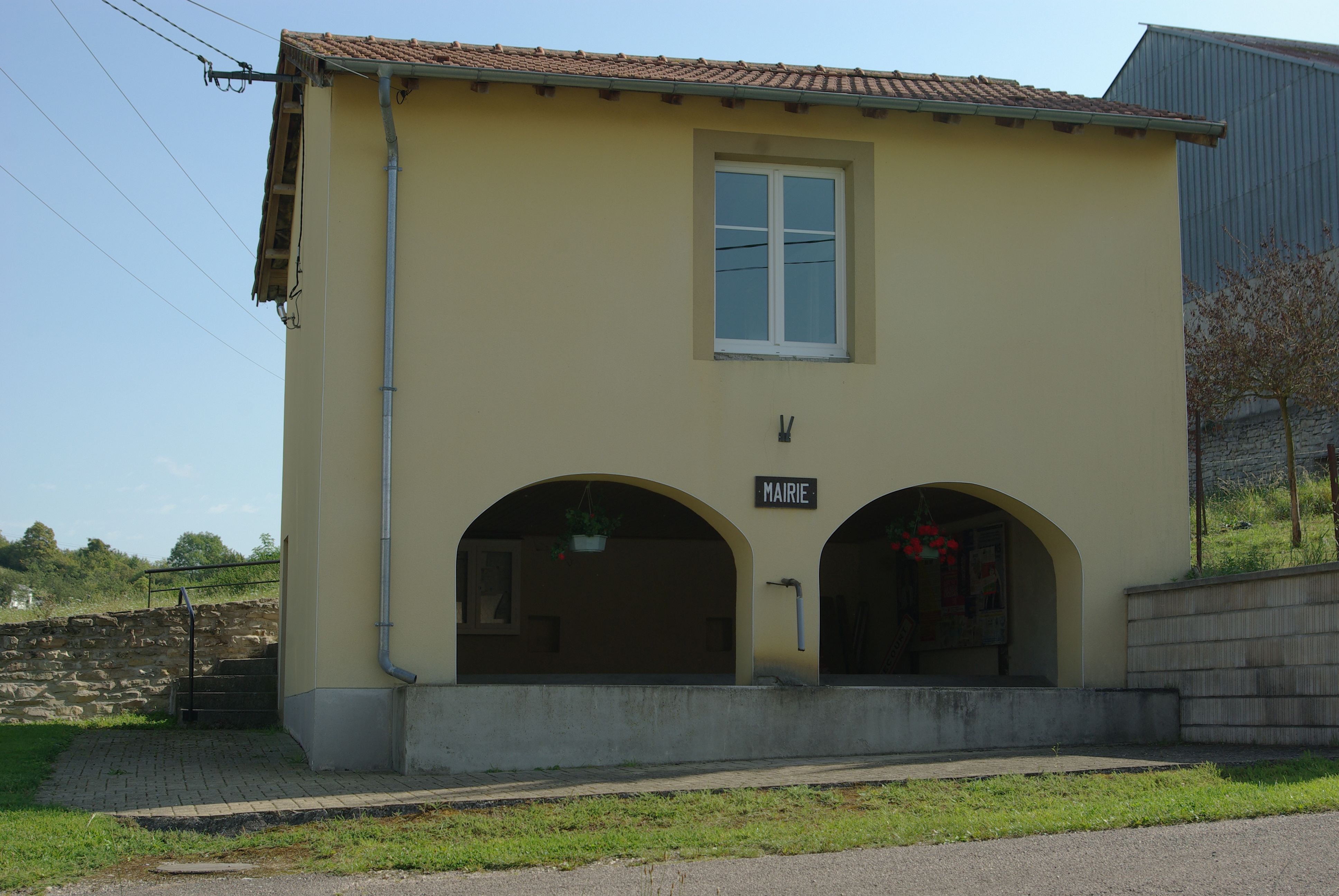 Mairie de Chauffecourt (88)